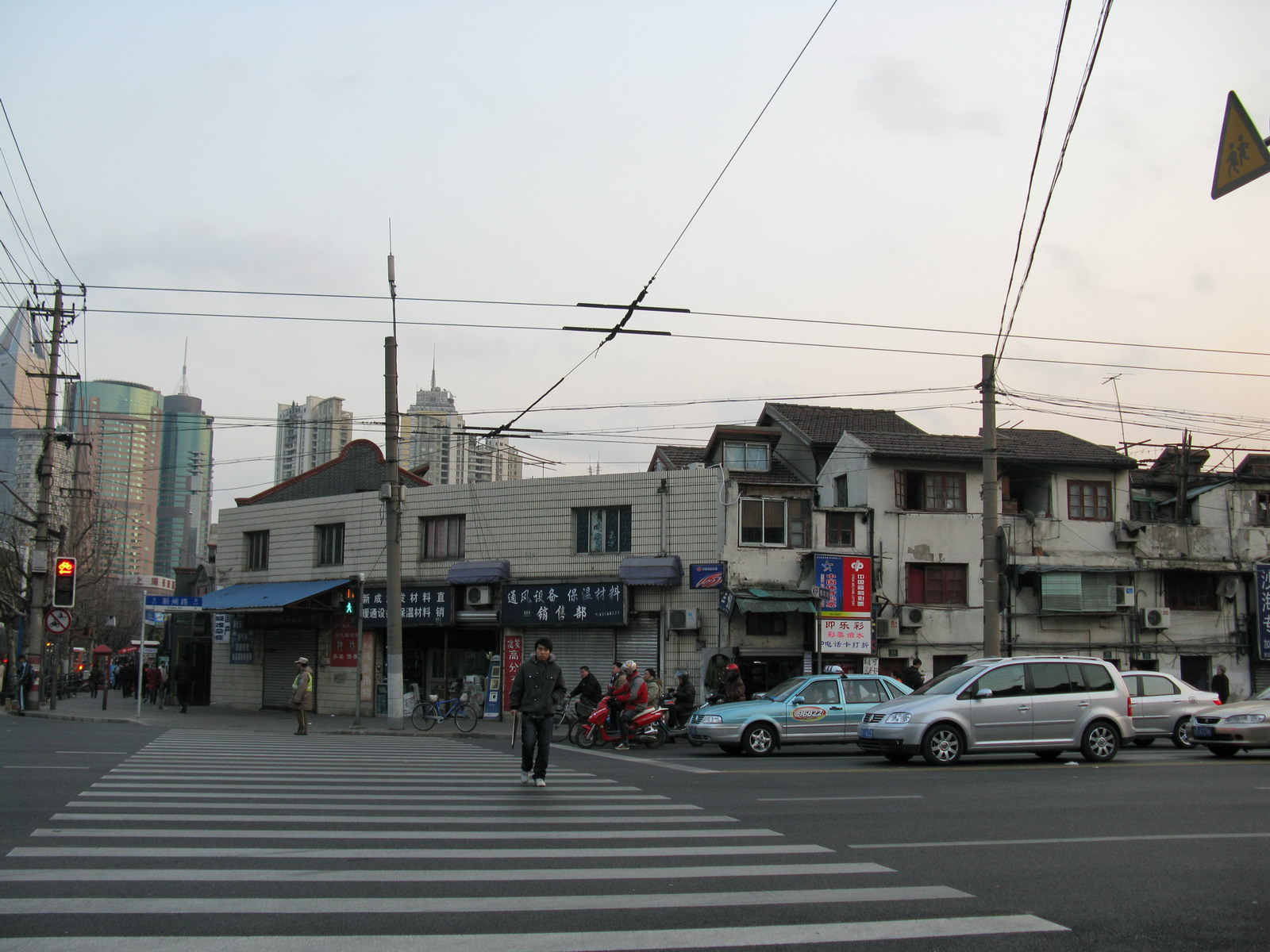 新闸路 成都北路 Xinzha Road, Chengdu Road (N)